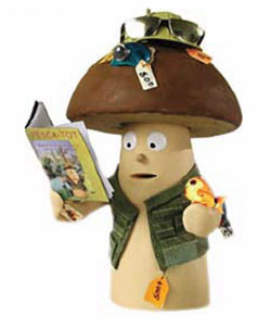 Imatge de Capelito